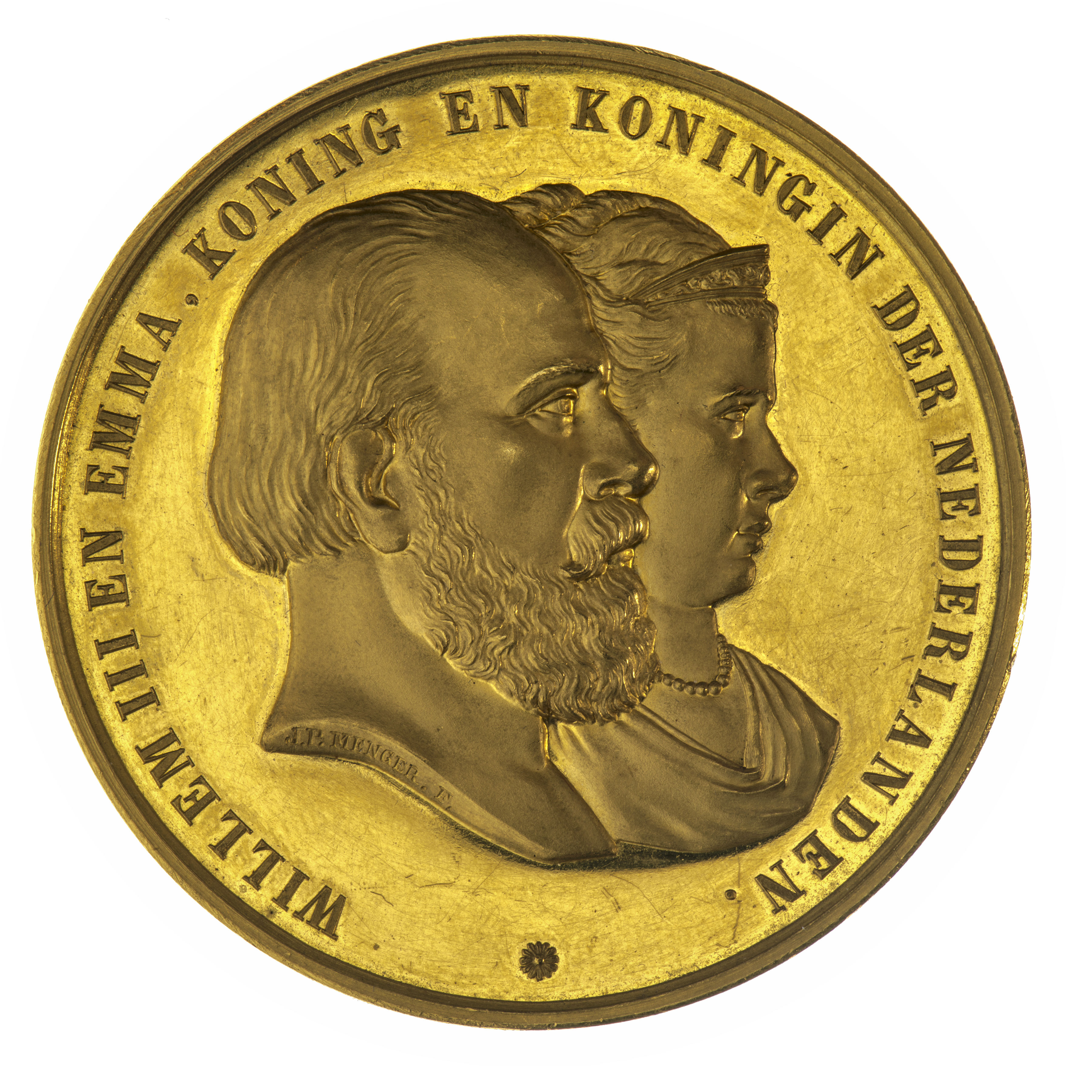 Objectgegevens Titel: Prijspenning ‘des Konings’ op naam van P.A. Schipperus (Rotterdam 1840 - Den Haag 1929) Beschrijving: Vz: borstbeelden van Willem III en Emma naar rechts. Kz: onder een koninklijke kroon, binnen een samengestrikte krans van links een oranjetak en rechts een lauwertak, een, onder omgekrulde en rechtsboven iets naar binnen gevouwen oorkonde, waarop gegraveerde tekst. Trefwoorden: prijspenning, gelegenheidspenning, penning, Opschrift / merk: Vz: omschrift "WILLEM III EN EMMA . KONING EN KONINGIN DER NEDERLANDEN", gesigneerd op afsnede borstbeeld "J.P. MENGER F". Kz: gegraveerd "P.A. SCHIPPERUS / 1879". Vervaardiger: 's Rijks Munt / vz: Johan Philip Menger (Utrecht 1818 - 1895) / kz: David van der Kellen (II) (Amsterdam 1804 - Utrecht 1879) Plaats vervaardiging: Nederland, Utrecht Datering: 1879 Materiaal: goud Afmetingen: (cm) dm 5,1 / 85,62 gram Associatie: Pieter Schipperus, schilder, kunstenaar, Rotterdam, koning, koning Willem III, Willem III, koningin, koningin Emma, Emma, koningshuis, Oranjehuis, Oranje Vorm & decoratie: academisch model Inventarisnr: Museum Rotterdam 83199